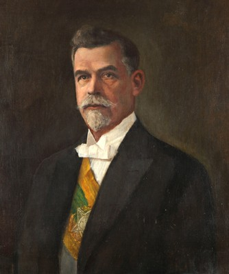 Pintura de Washington Luís da Presidência da República Federativa do Brasil.